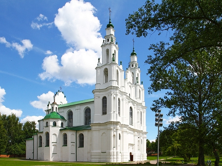 Полацк. Сафійскі сабор